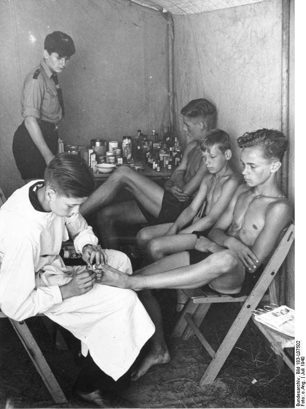 Scherl: HJ im Sommerlager, Aufnahmen vom Sommerlager der Berliner HJ in Bestensee. UBz: Blick in das Sanitätszelt, in dem gerade eine Fussuntersuchung stattfindet. 17.7.40